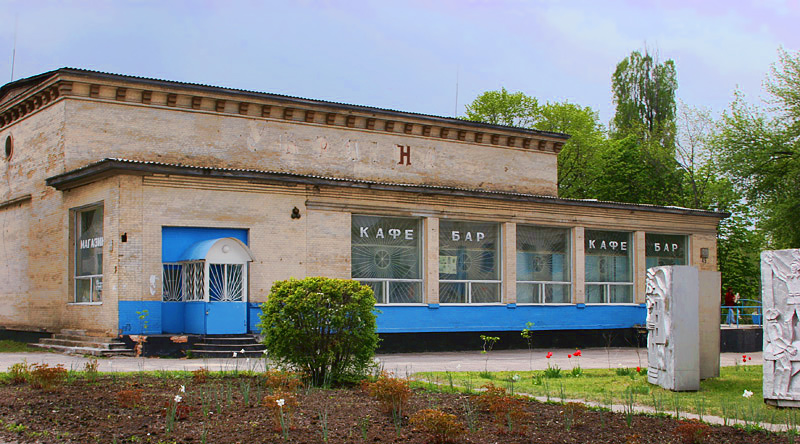 Кинотеатр в г. Чернобыле